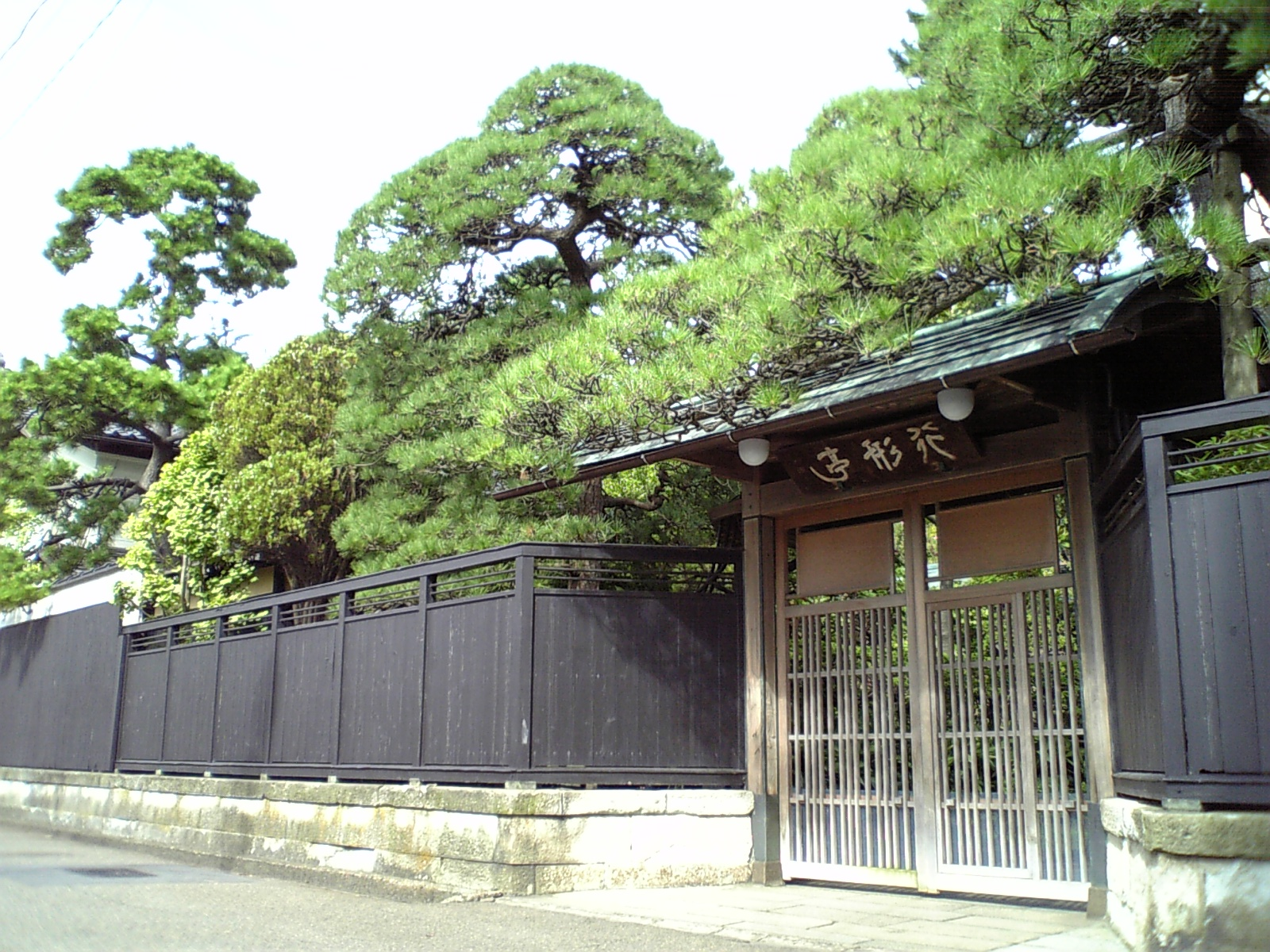 行形亭。